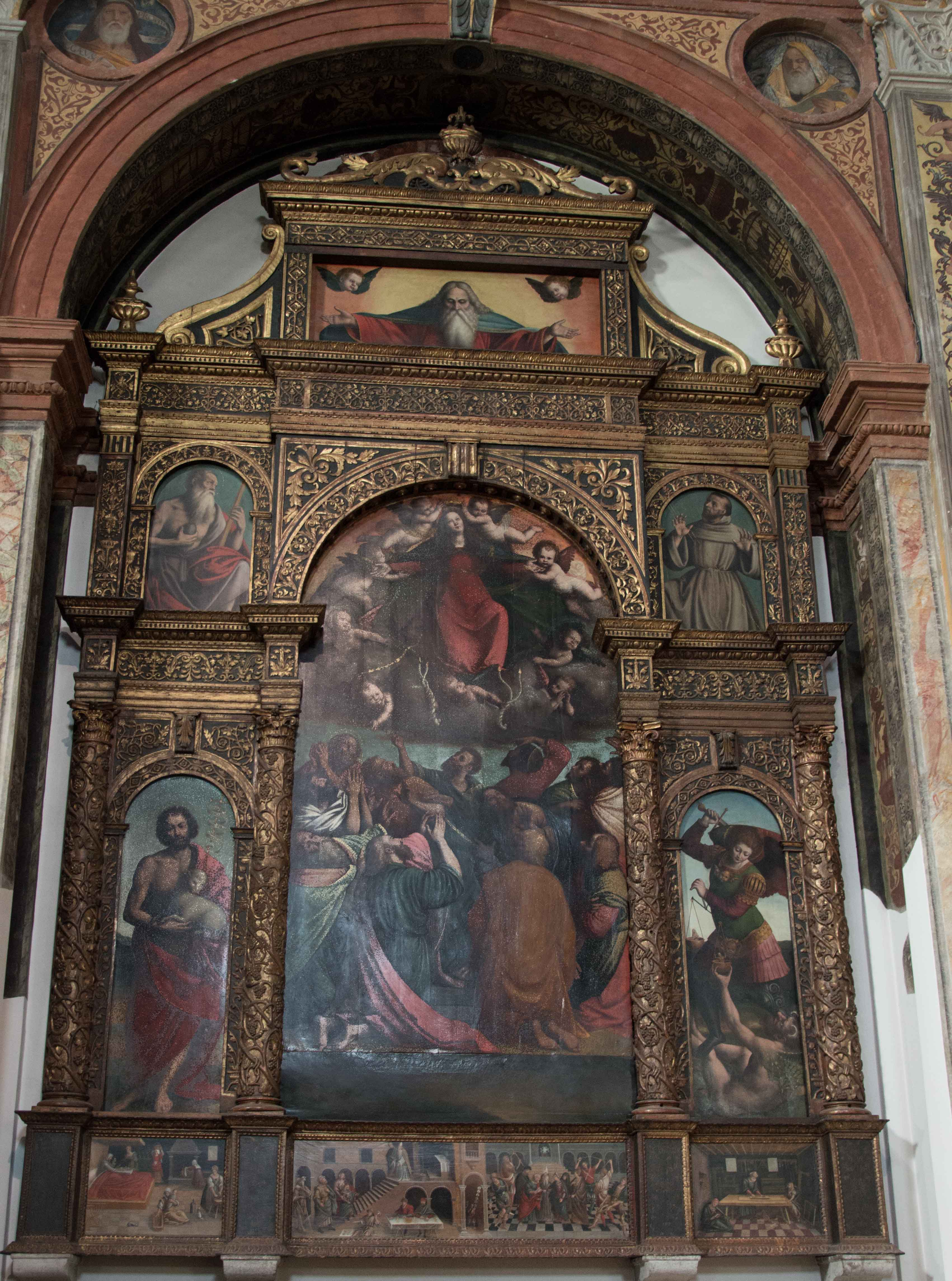 Santuario di Santa Maria di Piazza This is a photo of a monument which is part of cultural heritage of Italy.